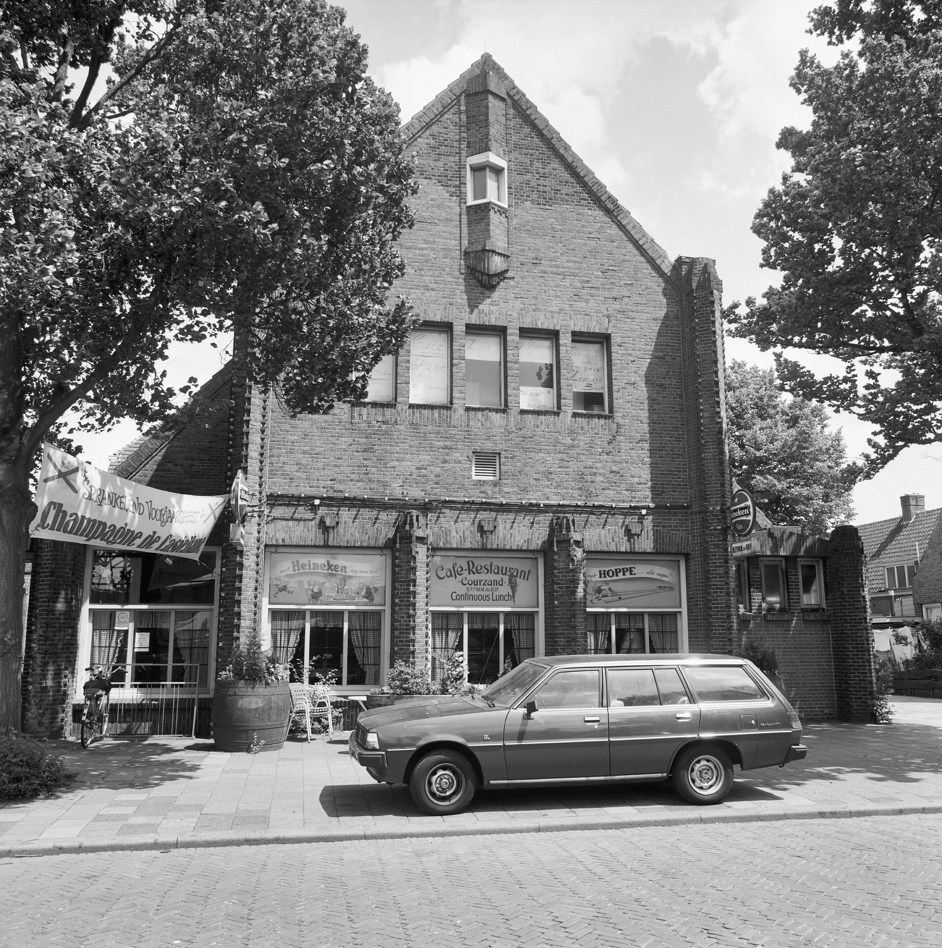 ontspanningsgebouw (thans caf‚), overzicht voorgevel